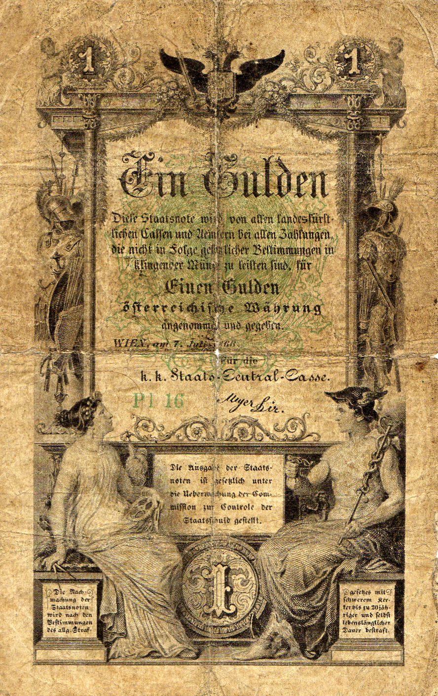 Jeden zlatník, emise 1. VI. 1868